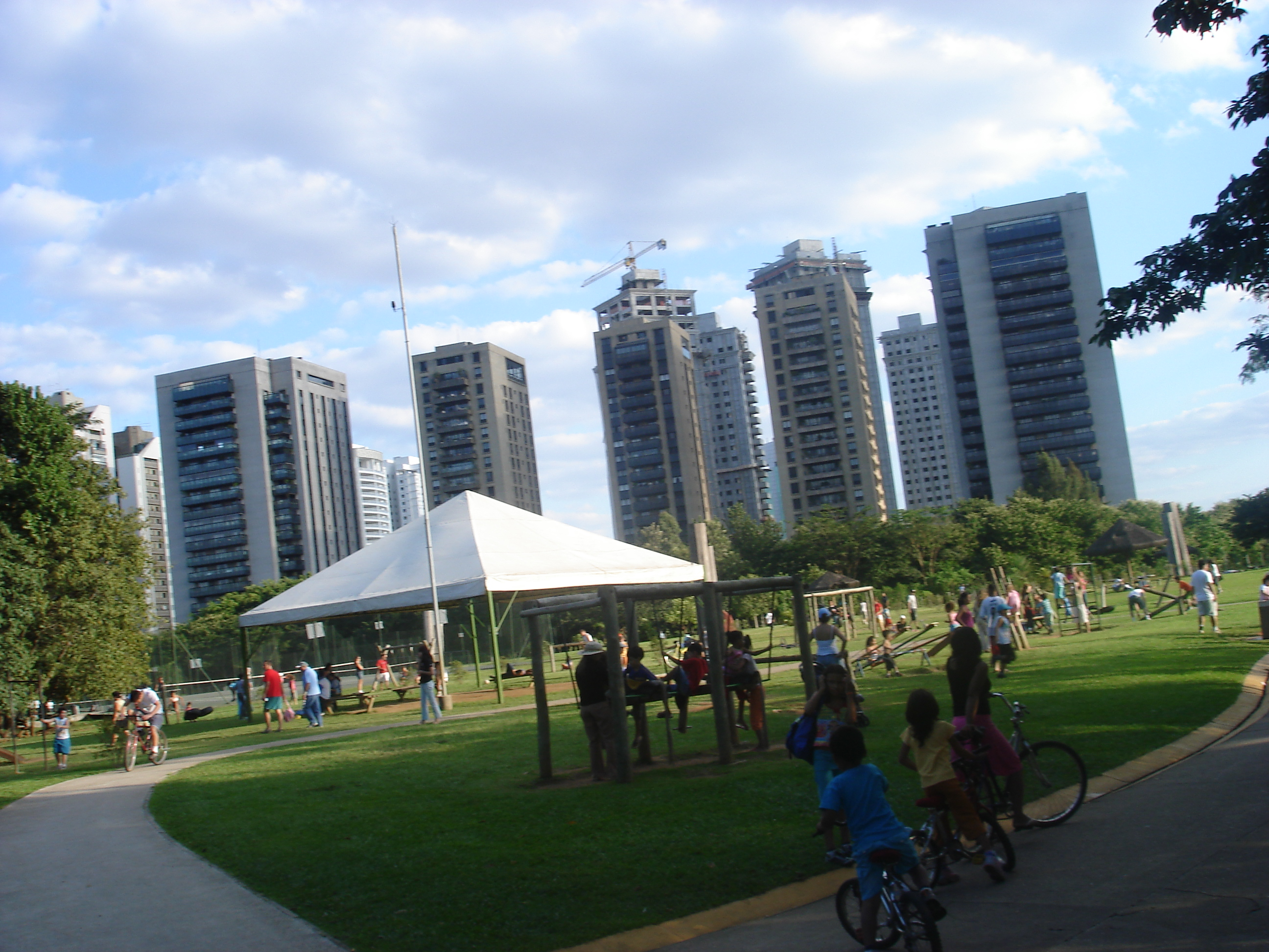 Villa-Lobos park, in São Paulo